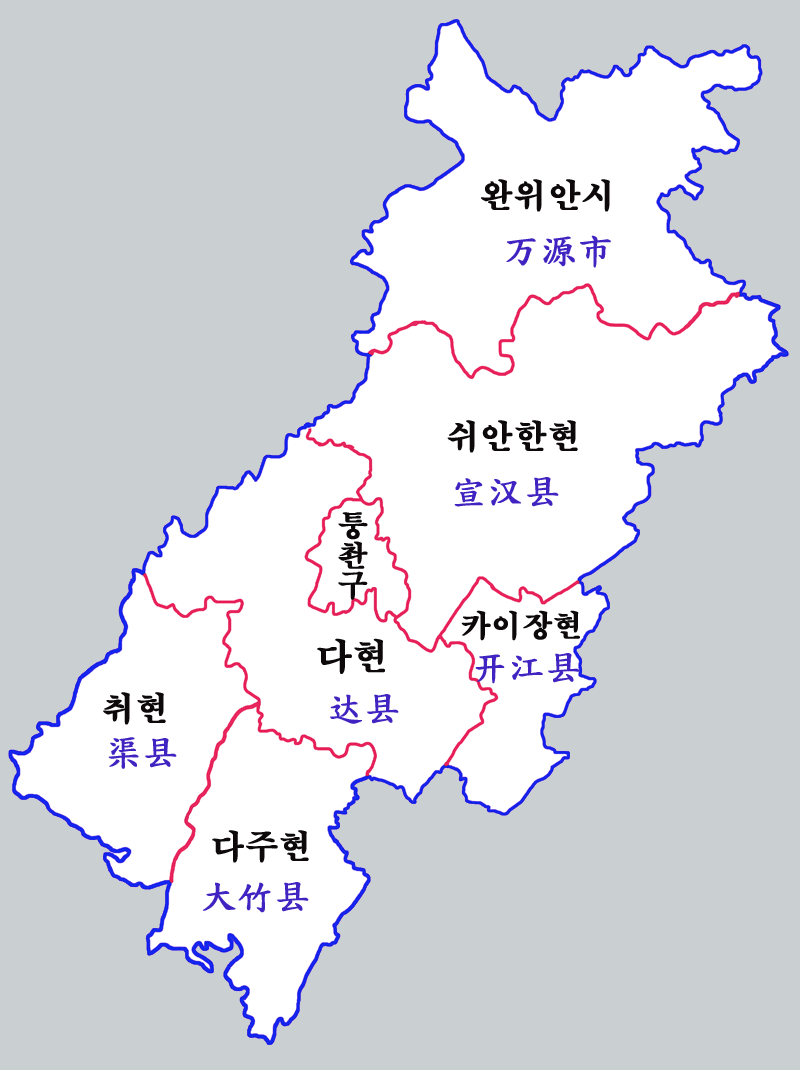 다저우시 현급구역도